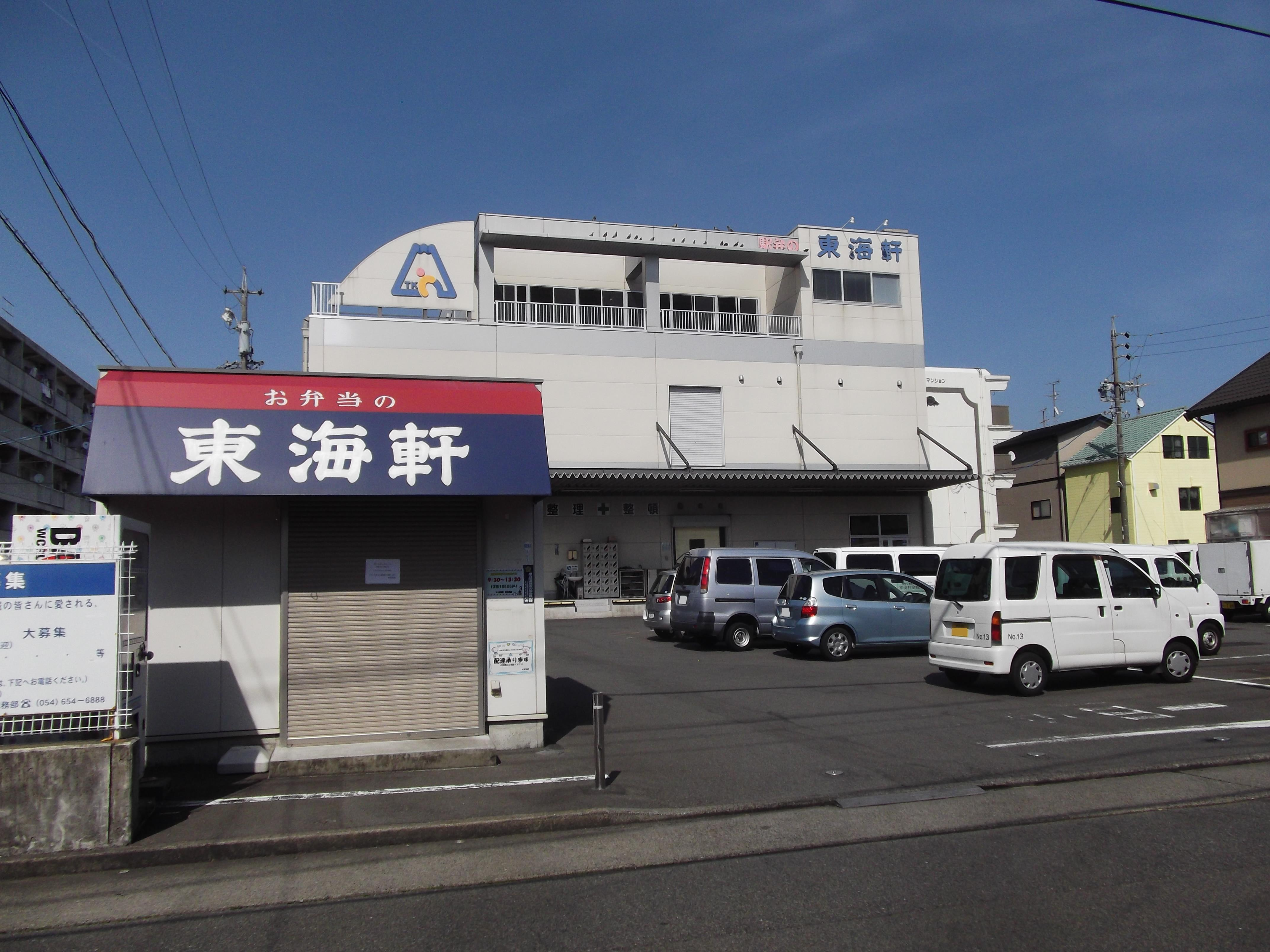 フジミ模型本社屋。静岡市駿河区。